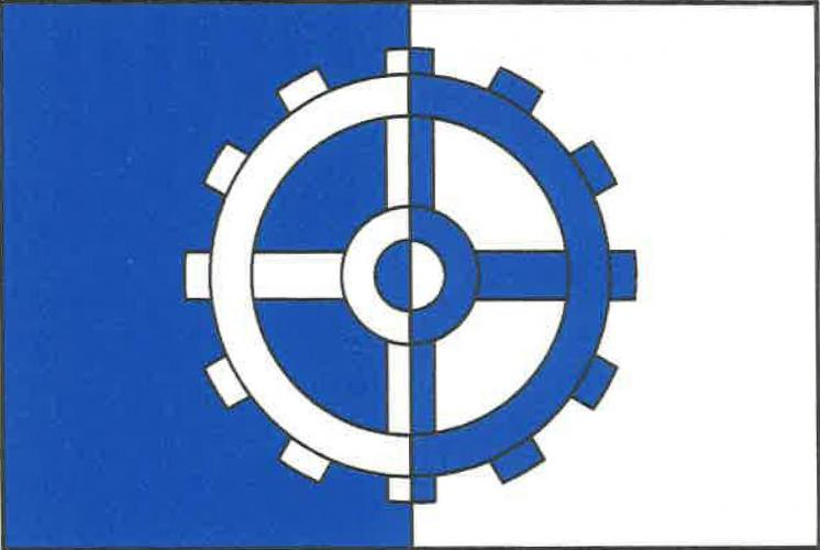 Onšov PE vlajka